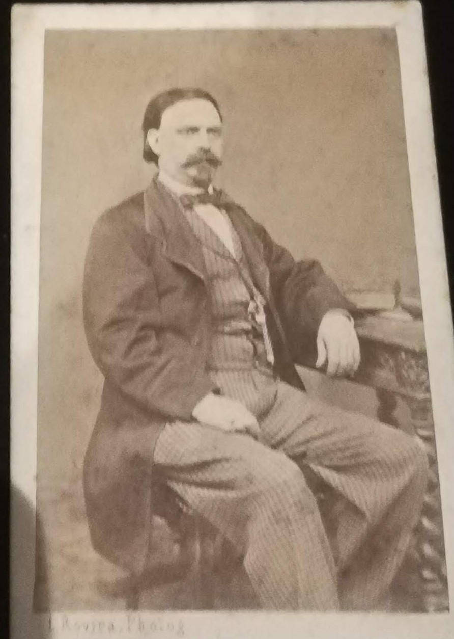 Retrat Francesc Dalmau